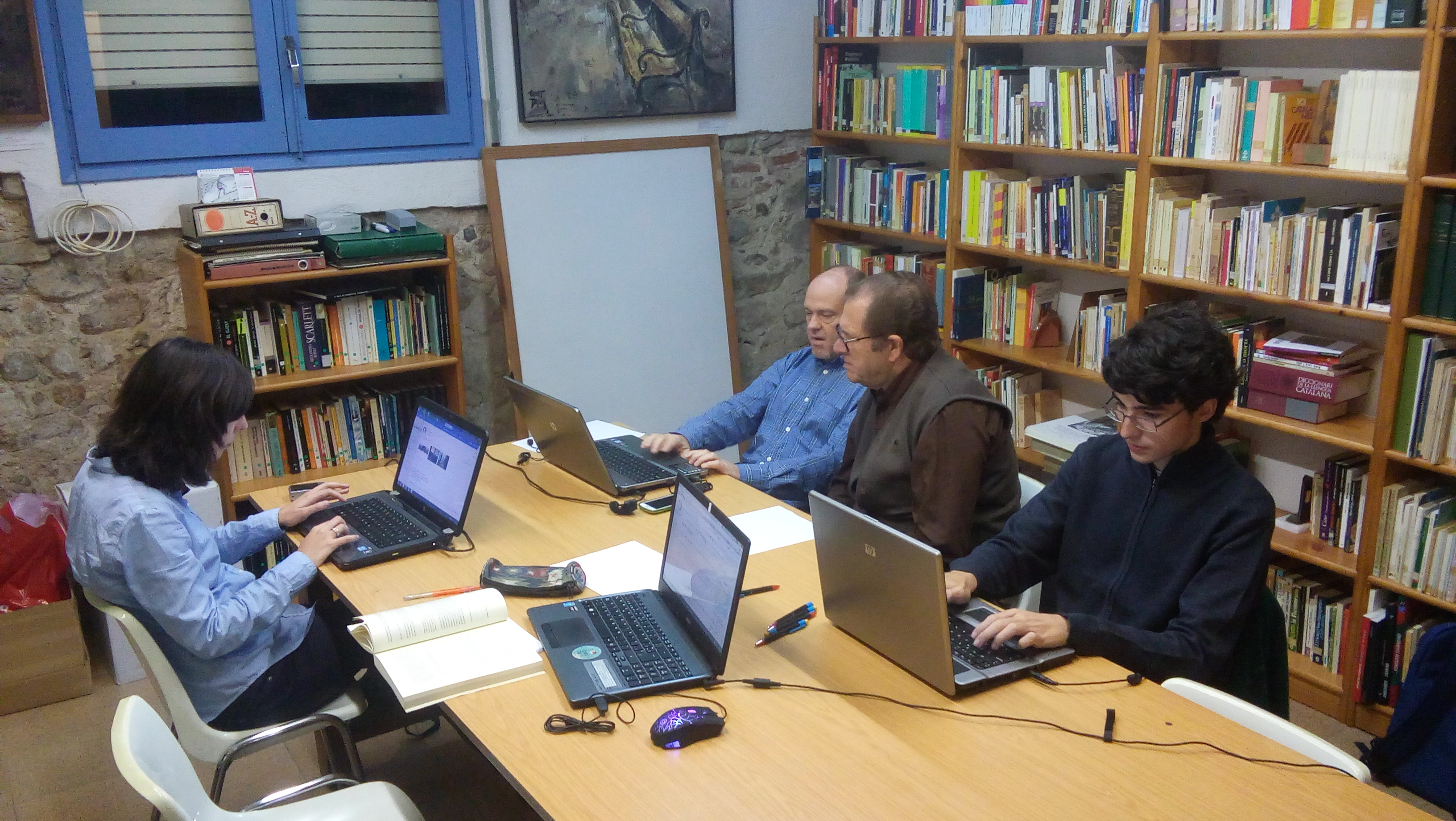 Viquimarató sobre el municipi de Riudoms al Centre d'Estudis Riudomencs Arnau de Palomar.